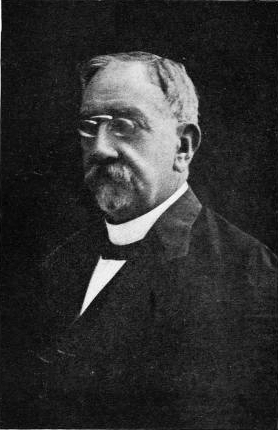 Luis Melian Lafinur